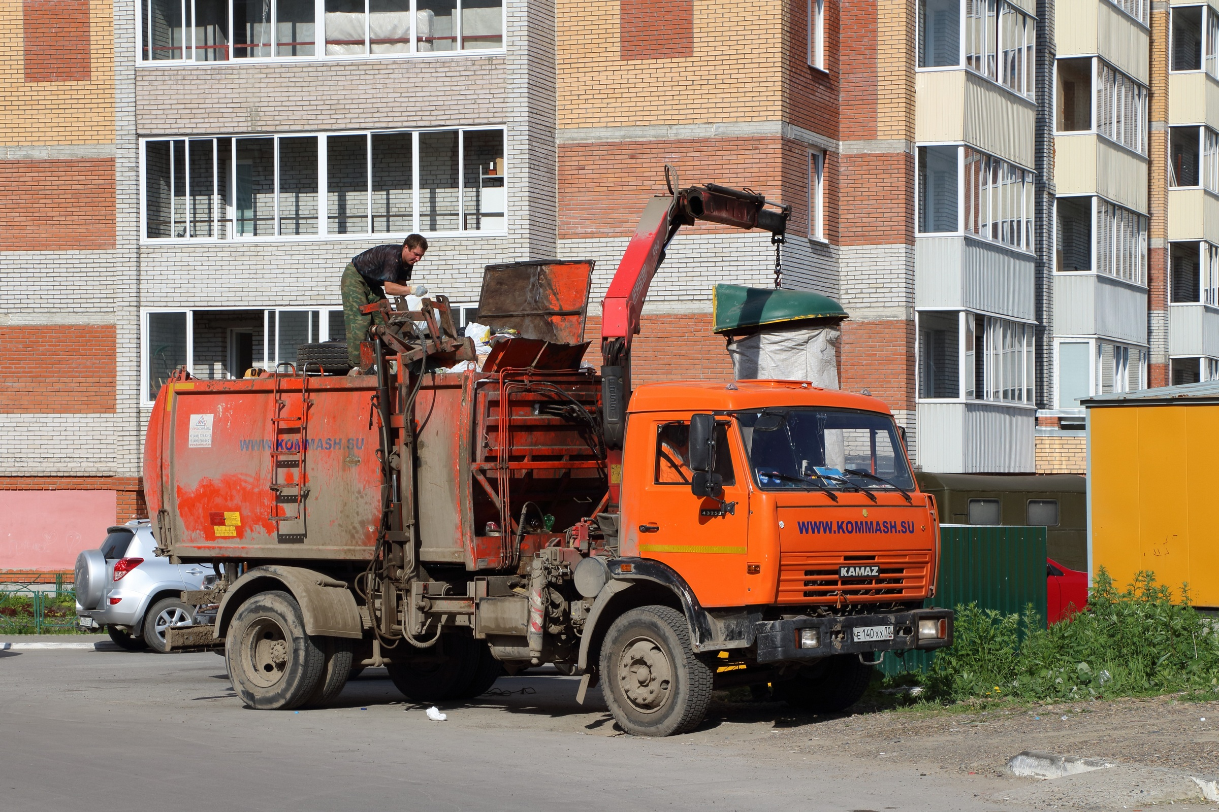 Мусоровоз на шасси КамАЗ-43253 в Томске